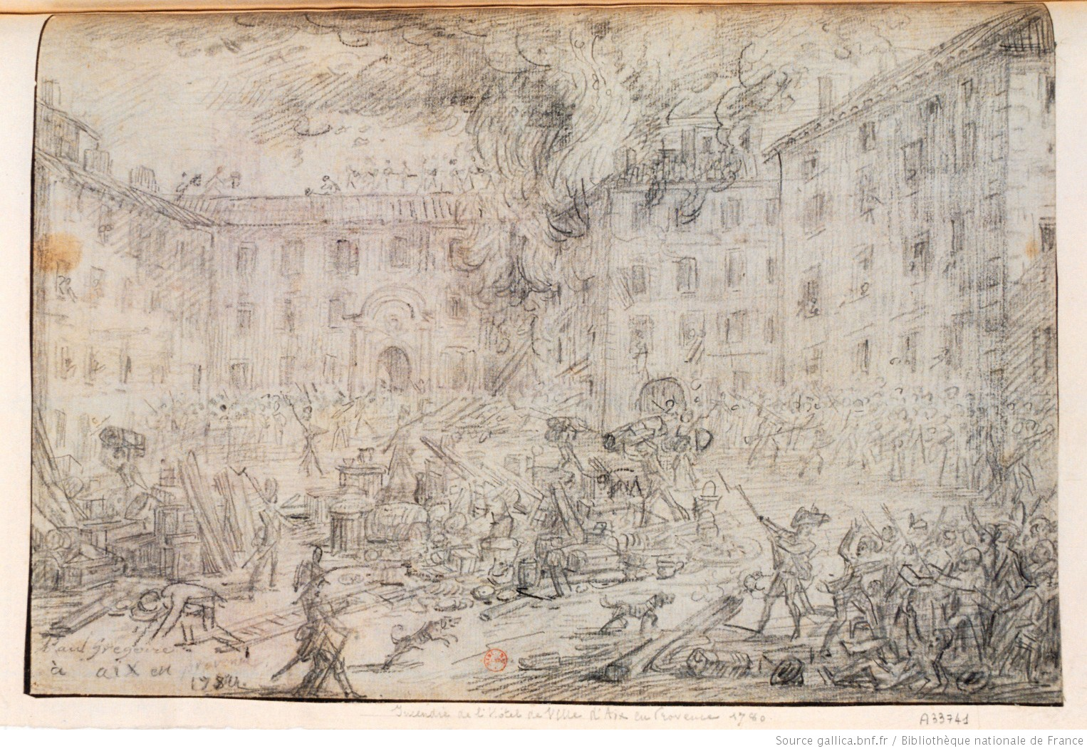 « Incendie de l'Hôtel de Ville d'Aix-en-Provence » par Paul Grégoire, 1780. Dessin à la pierre noire ; 27,8 x 38,7 cm